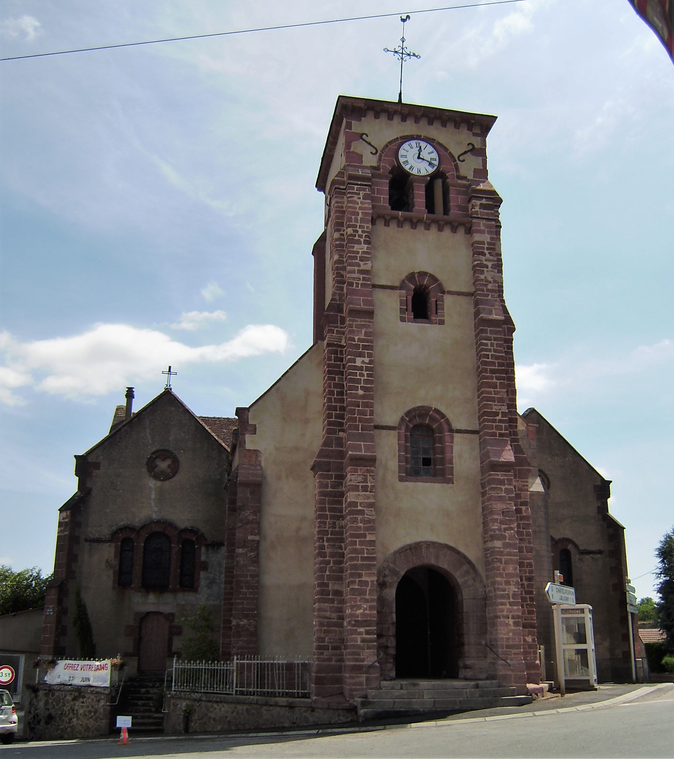 EGLISE SAINT LEON